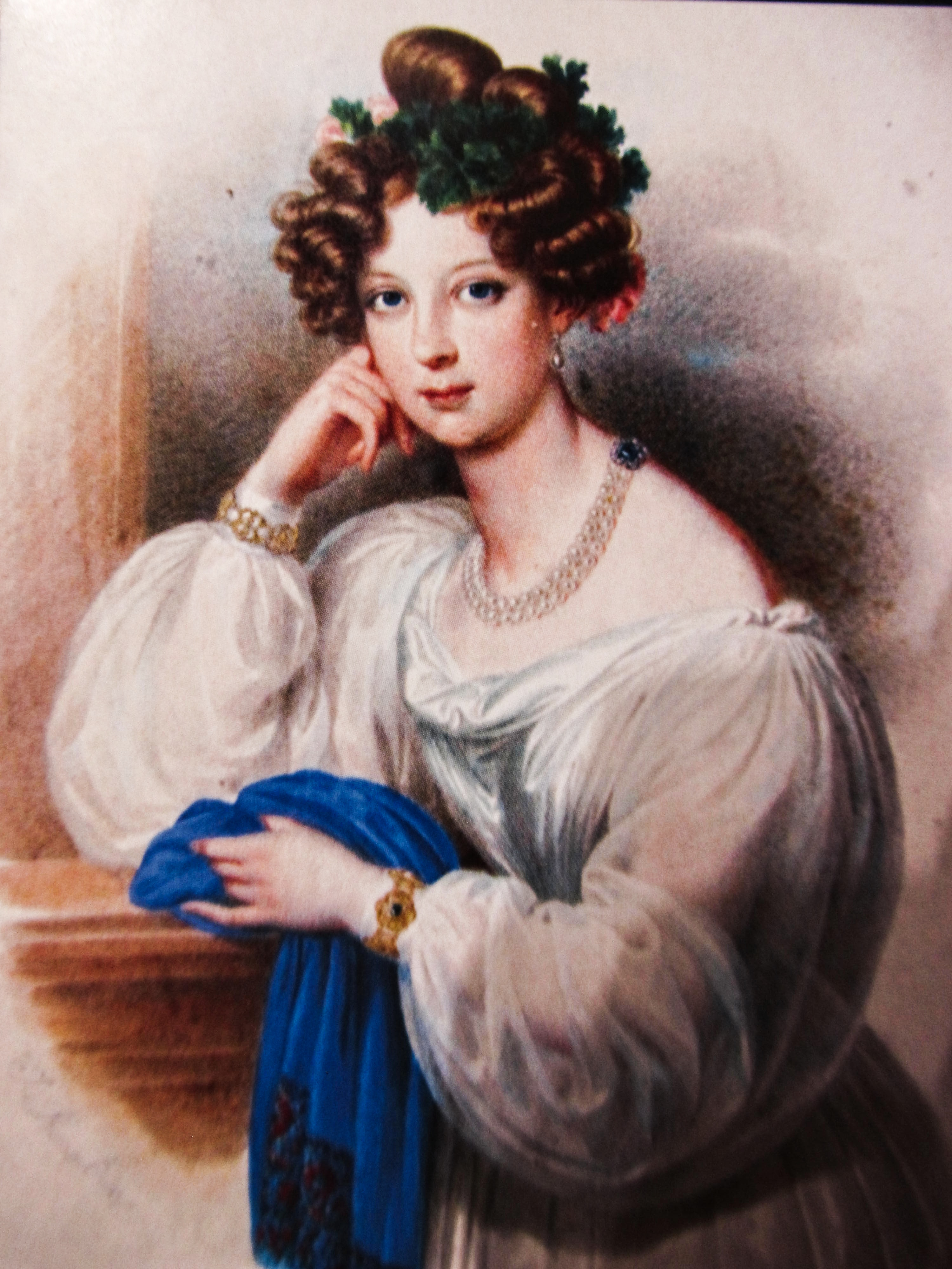 Kněžna Marie Eleonora Windischgrätazová, rozená Schwarzenbergová (1796-1848)